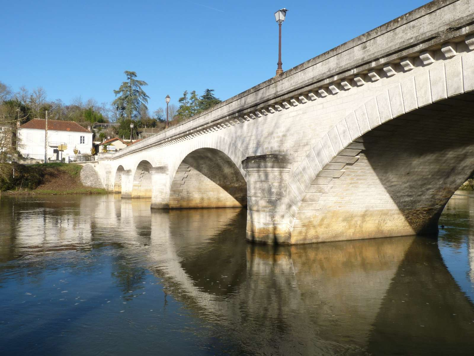 pont sur la Charente à la Terne, Luxé, Charente, France